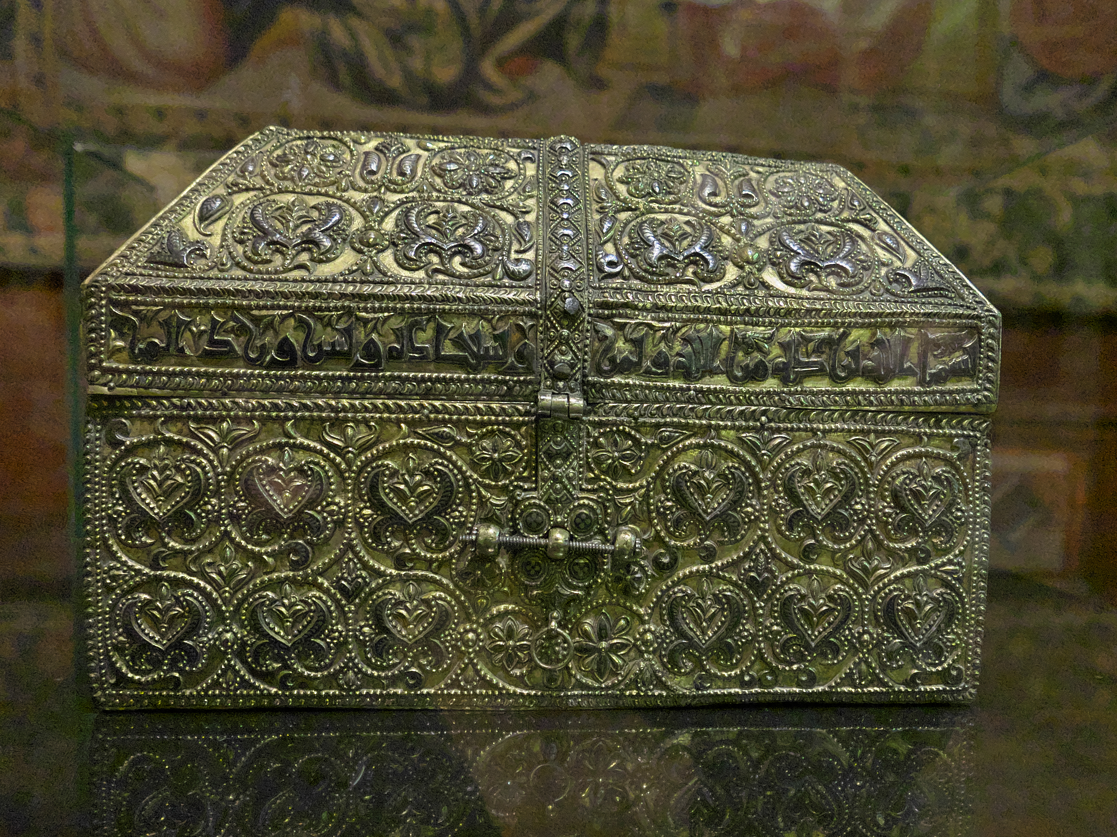 El califa al-Hakam II encarga (h. 976) a los abid de Madīnat al-Zahrā, Badr y Tarîf, una arqueta de madera recubierta de plata repujada, nielada y dorada, para su hijo y sucesor Hišām II.